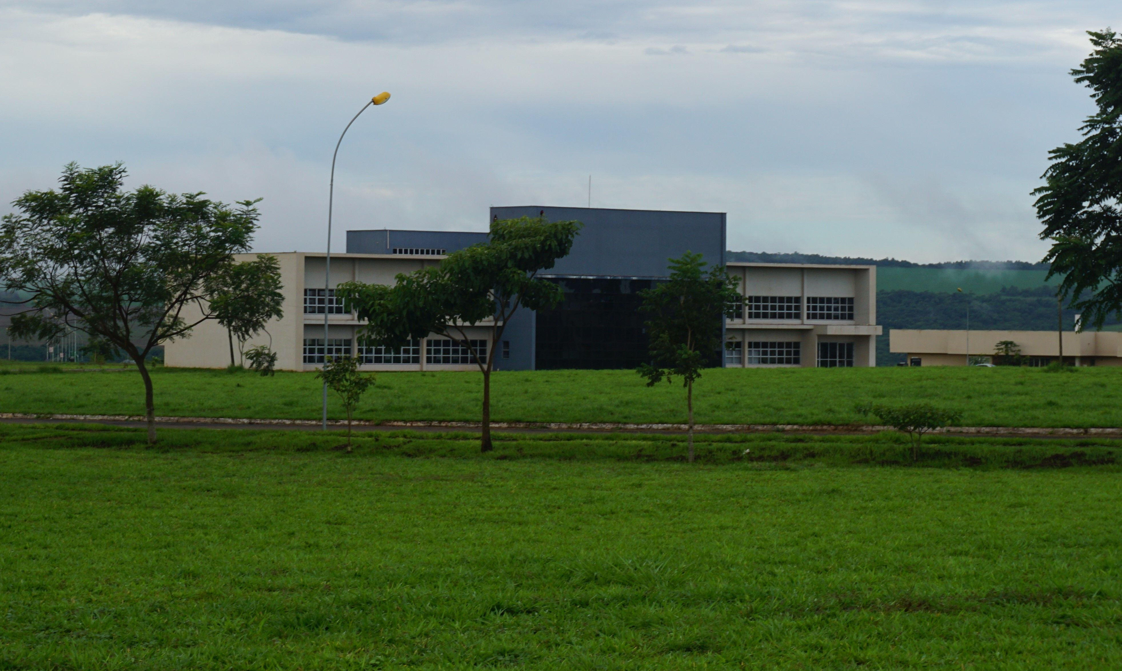 Fotografia da Biblioteca Flor-do-Cerrado no Câmpus Jatobá da Universidade Federal de Jataí.